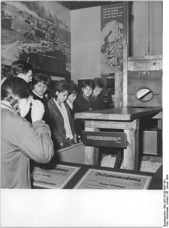 Berlin, Jugendstunde im Museum für Deutsche Geschichte Zentralbild Hochneder 30.1.1964 Jugendstunde im Museum für Deutsche Geschichte "Krieg ist kein Gesetz der Natur" lautet das Thema der Jugendstunde für die Schüler der 8. Klasse der 29. Oberschule Berlin-Karlshirst am 30.1.1964. Zum besseren Verständnis besuchten sie die Ausstellung "Deutschland von 1933-1945" im Museum für Deutsche Geschichte Unter den Linden.